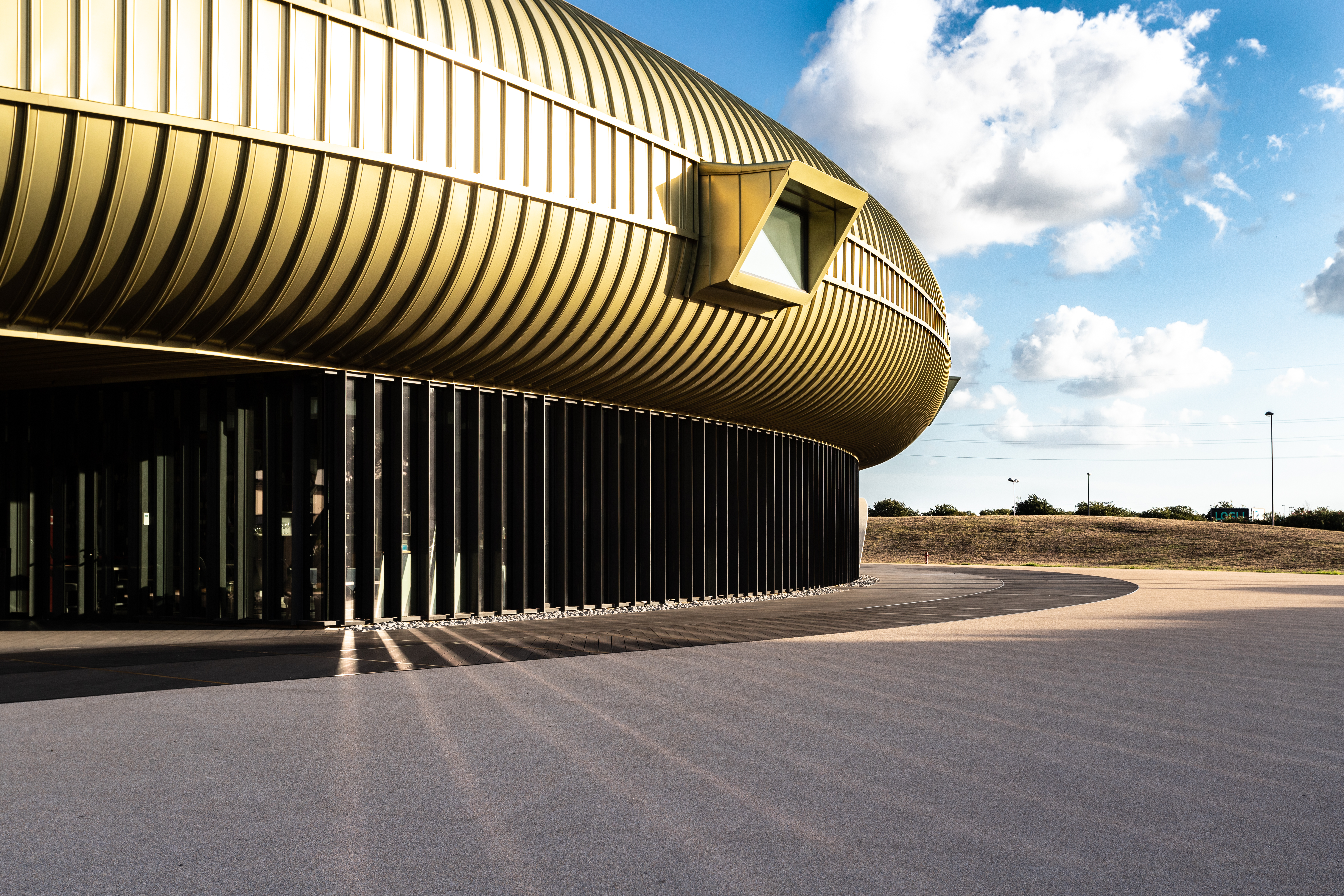 Centro per l'arte contemporanea Luigi Pecci This is a photo of a monument which is part of cultural heritage of Italy.